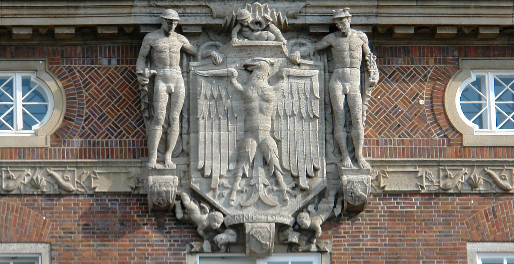 Postamt 5 in Bremen, Bahnhofsplatz 20. Wappen mit Schildträgern über dem Eingangs-Vorbau. Bauplastiker Richard KuöhlDas abgebildete Objekt ist ein geschütztes Kulturdenkmal in der Freien Hansestadt Bremen, mit der Nr. 0102 beim Landesamt für Denkmalpflege registriert.